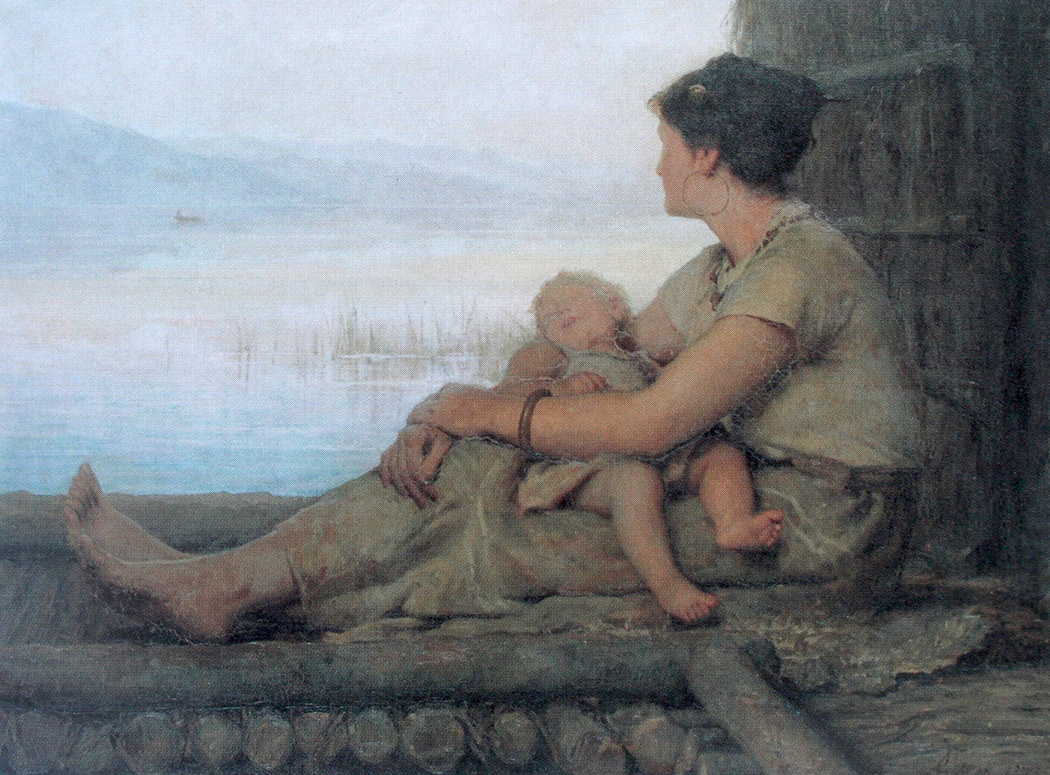 Die Pfahlbauerin, Gemälde von Albert Anker, 1873, 65 x 81 cm, Musée de Beaux-Arts, La Chaux-de-Fonds